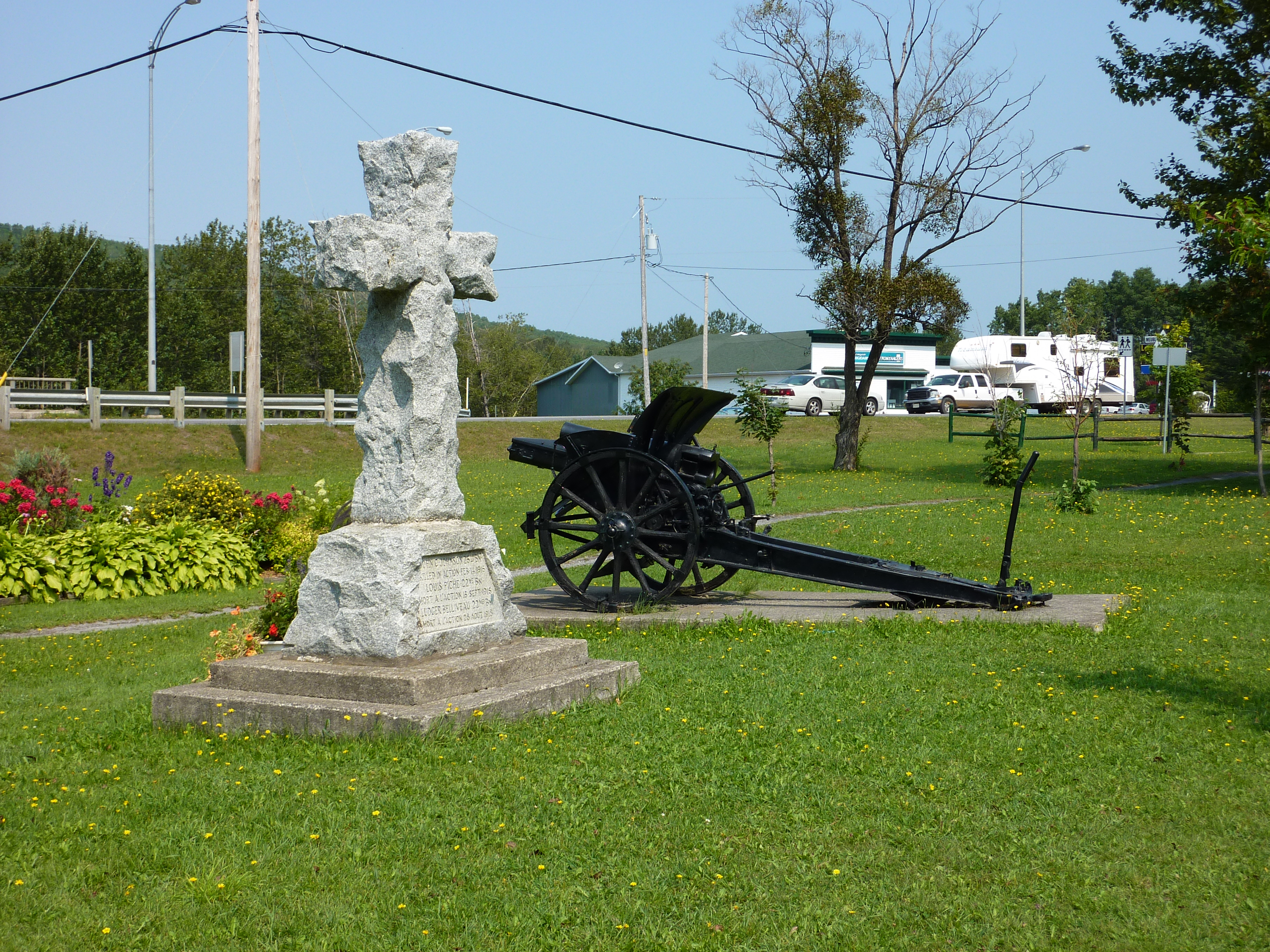 Monuments dans le parc du Tournant-de-la-Rivière à Sayabec